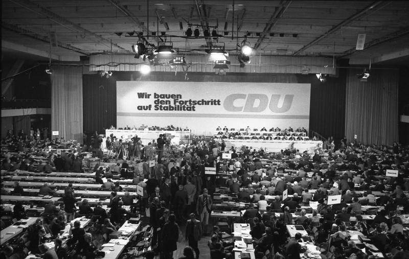 CDU-Parteitag 1972 in der Wiesbadener Rhein-Main-Halle 9.-11.10.1972